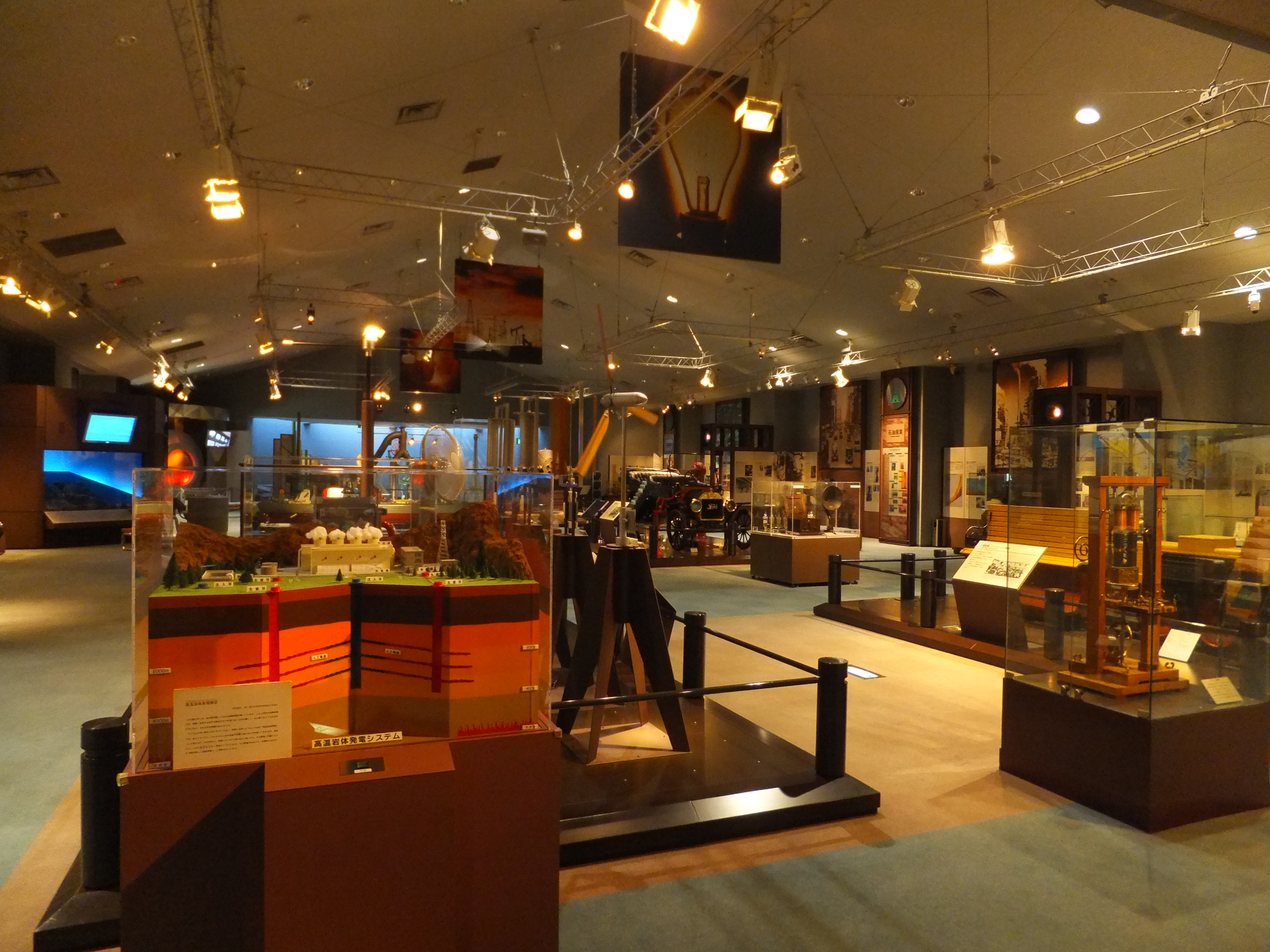 千葉県立現代産業美術館、展示室